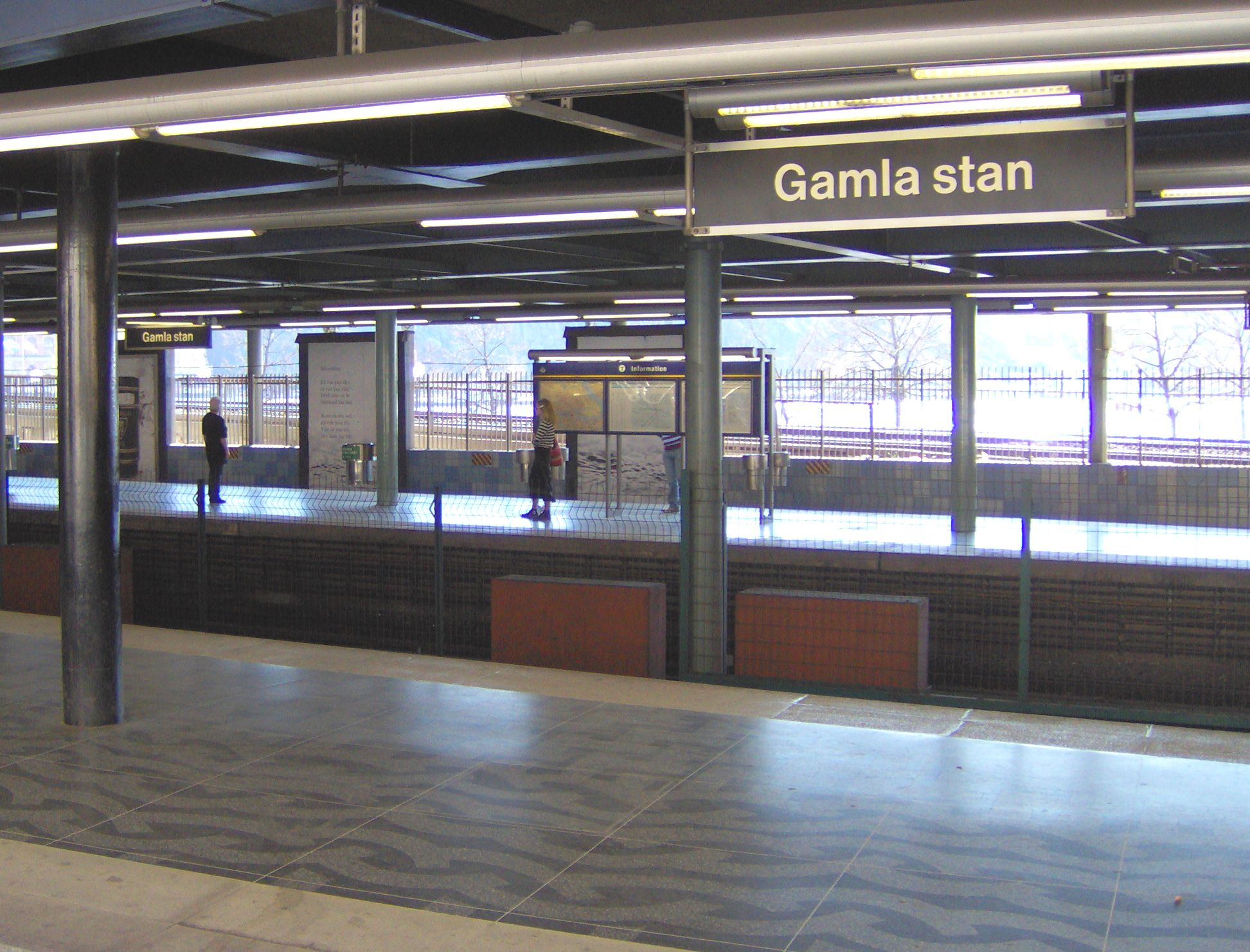 Gamla Stans Tunnelbanestation, Stockholm. Old City, Underground station, Stockholm, Sweden. 2006